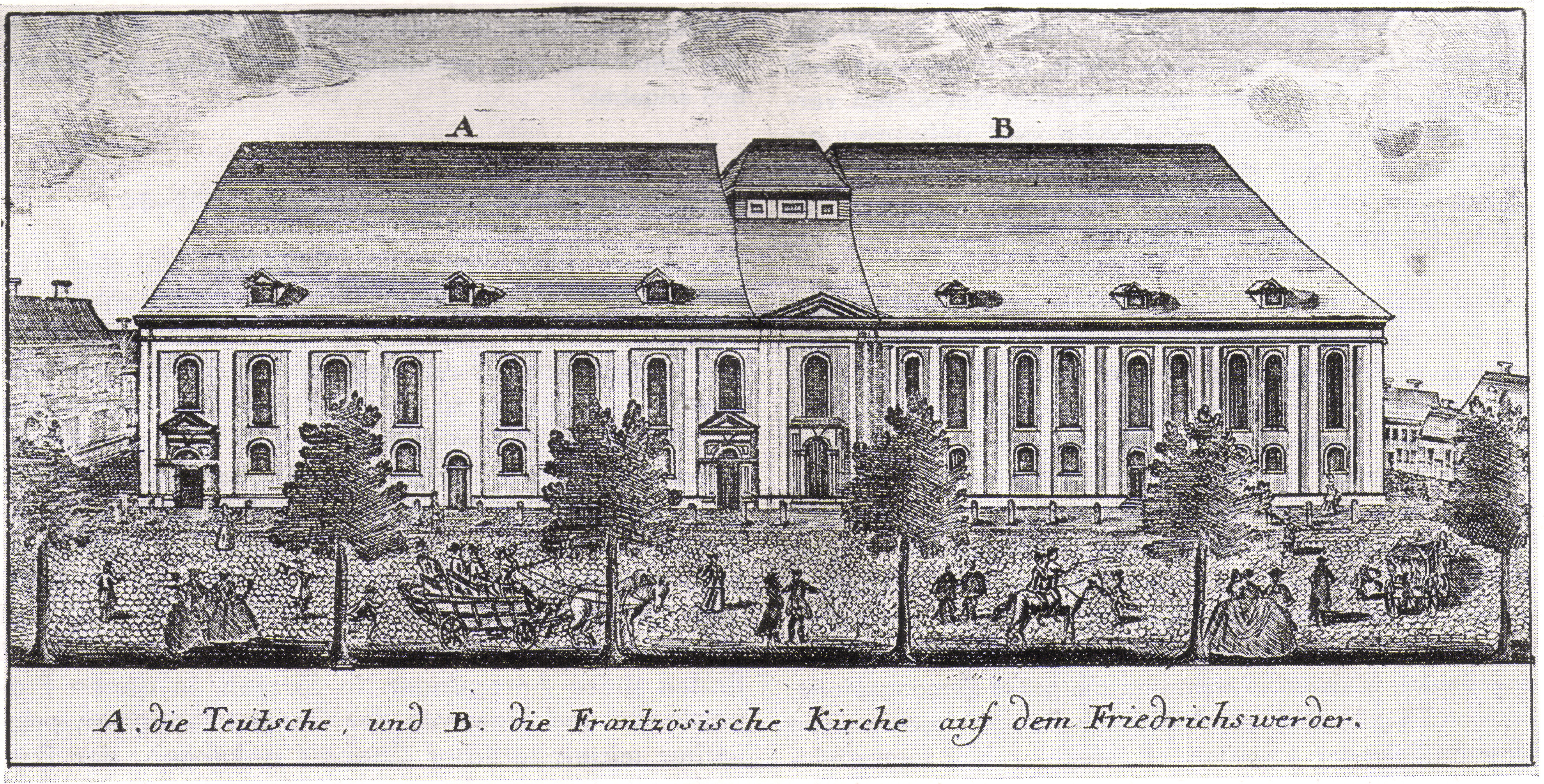 FWK_Teutsche_&_Frantzösische_Kirche.jpg "Die Teutsche und die Frantzösische Kirche auf dem Friedrichswerder" Vedute auf dem "Abriß der Königlich preußischen Residentzstadt Berlin" Stadtplan von Johann David Schleuen von 1760 Kupferstich, 9,7cm x 19,9cm Im Jahre 1987 in der Deutschen Staatsbibliothek Berlin(Ost), Kartenabteilung